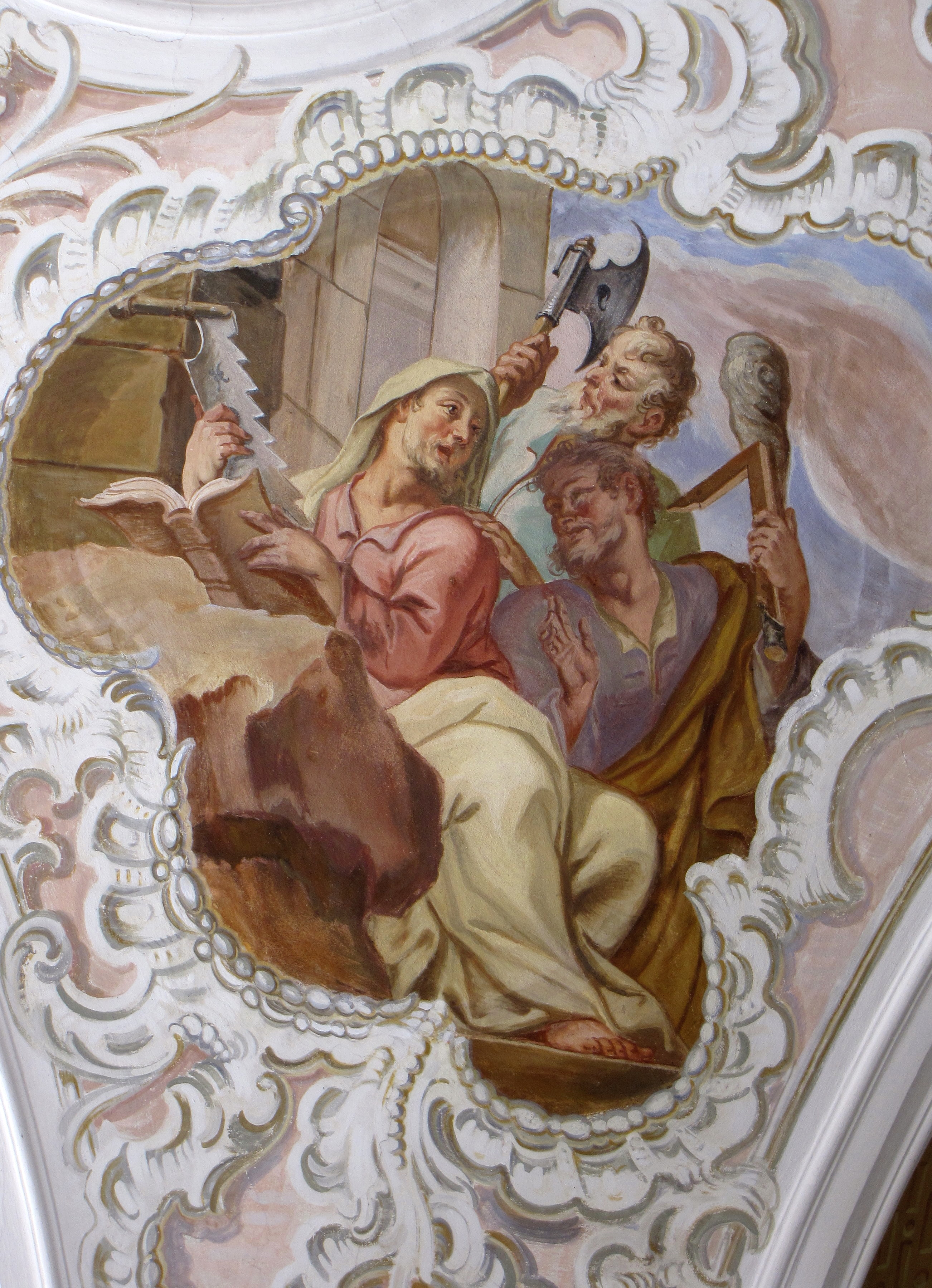 Fresko von Johann Georg Wolcker in der Kirche von Lindenberg (Buchloe)